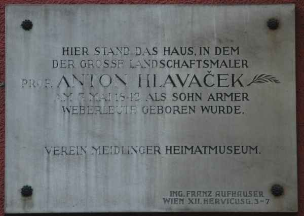 Gedenktafel für Anton Hlavacek, Aichhorngasse 8, Wien-Meidling